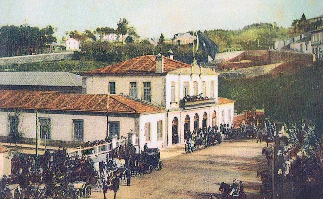 A estación de tren de Vigo foi proxecto do ano 1860 do enxeñeiro Francisco Javier Boquerín. As obras concluíron en 1878, tres años antes da finalización da liña Ourense-Vigo. En 1923 construíuse unha nova planta nas ás laterais, quedando á mesma altura da parte central do edificio.